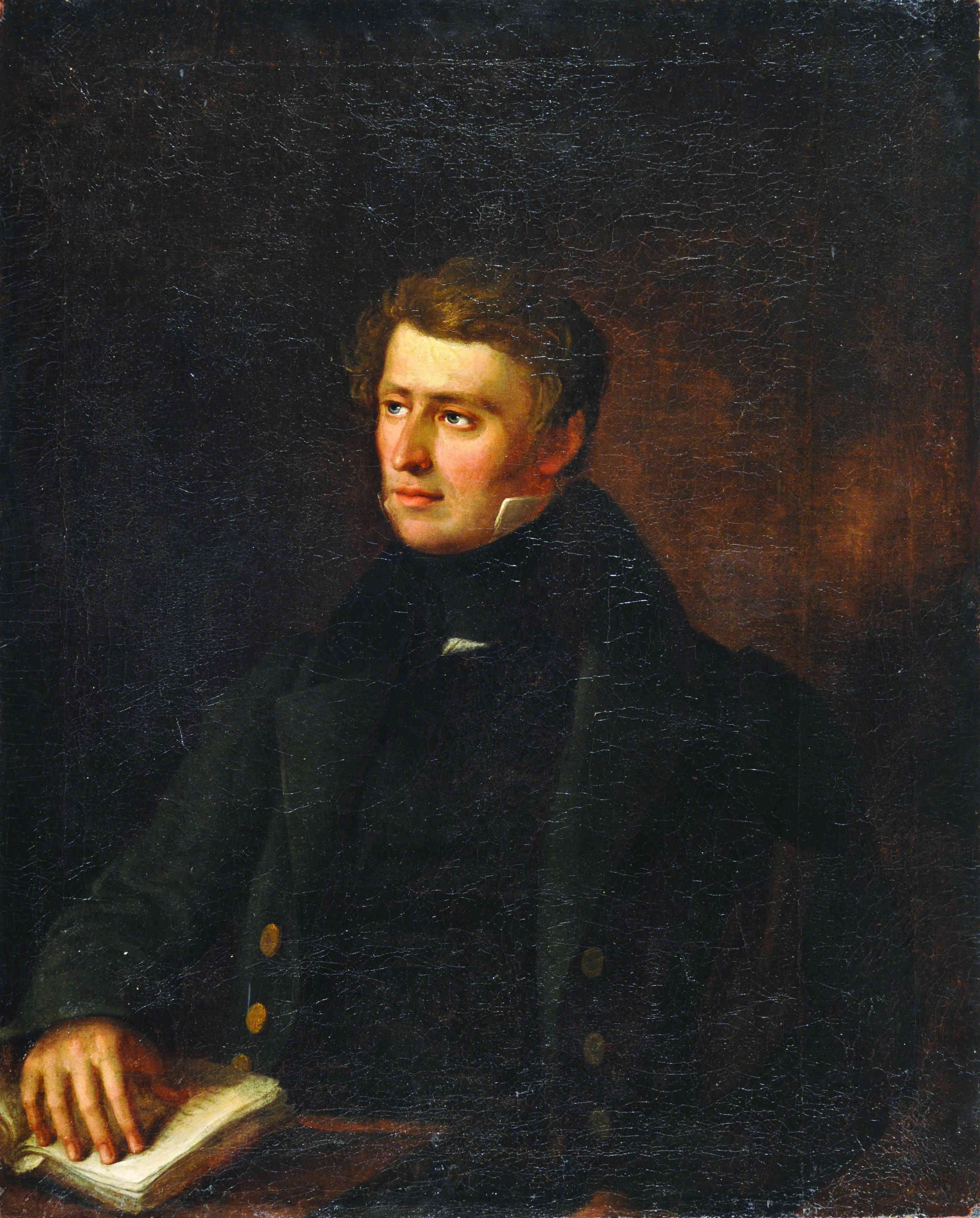 Партрэт Тамаша Зана